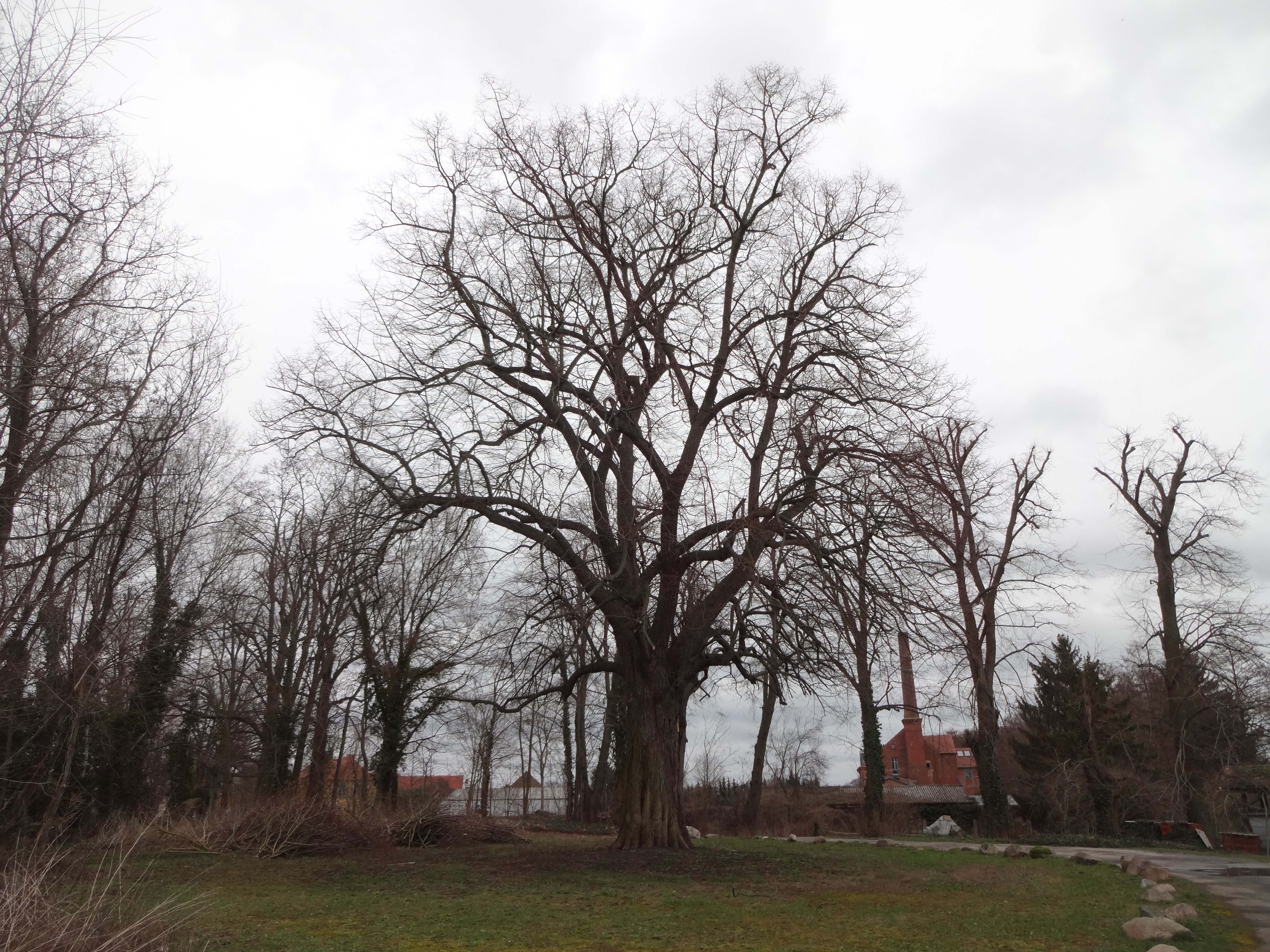 als Naturdenkmal geschützte Schloss-Linde in Golzow